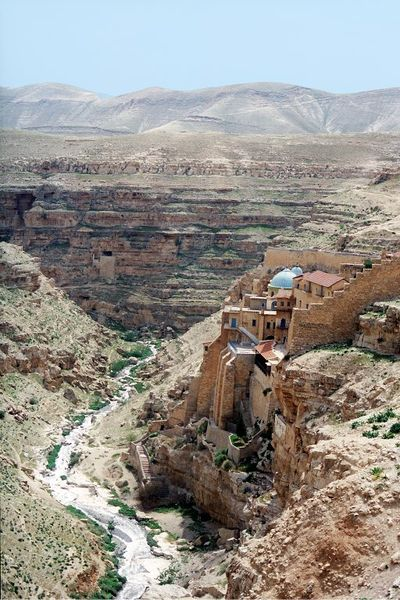 מנזר מרסבא במדבר יהודה. צולם על ידי יואב רוזנברג.